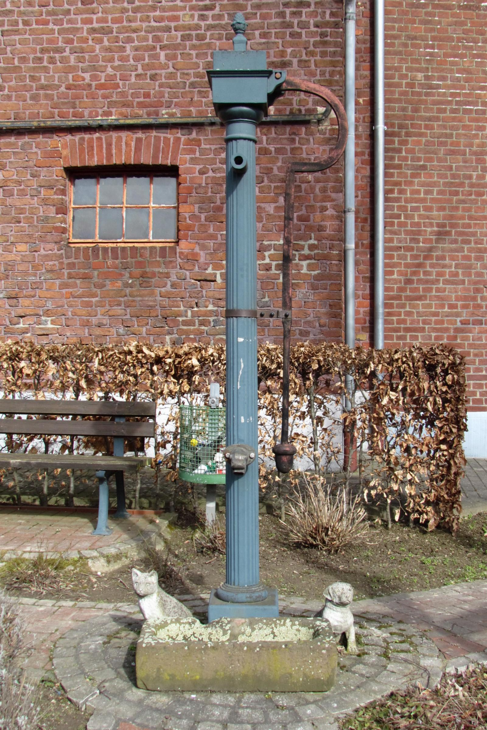 Pumpe in Harzelt